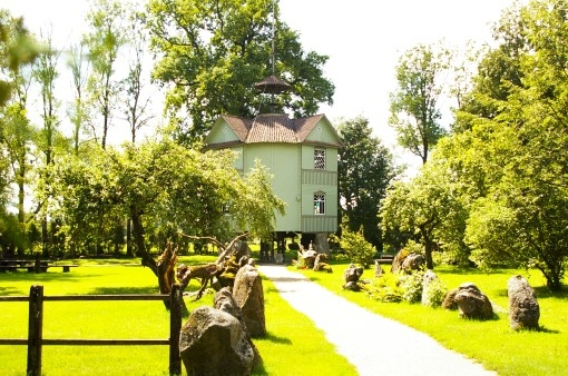 Adomo Petrausko muziejus